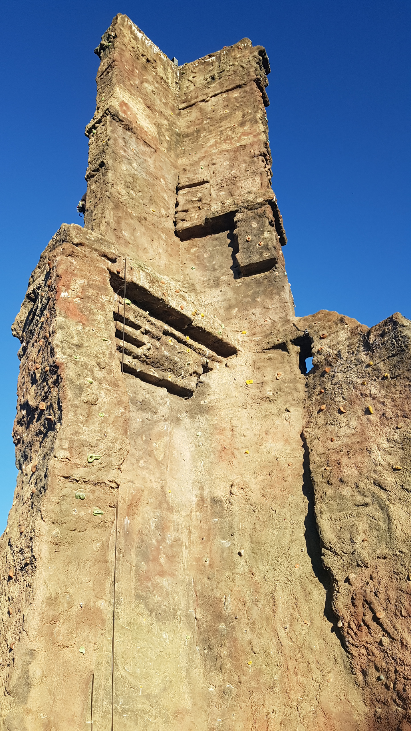 Kletterfelsen Magdeburg Nahaufnahme